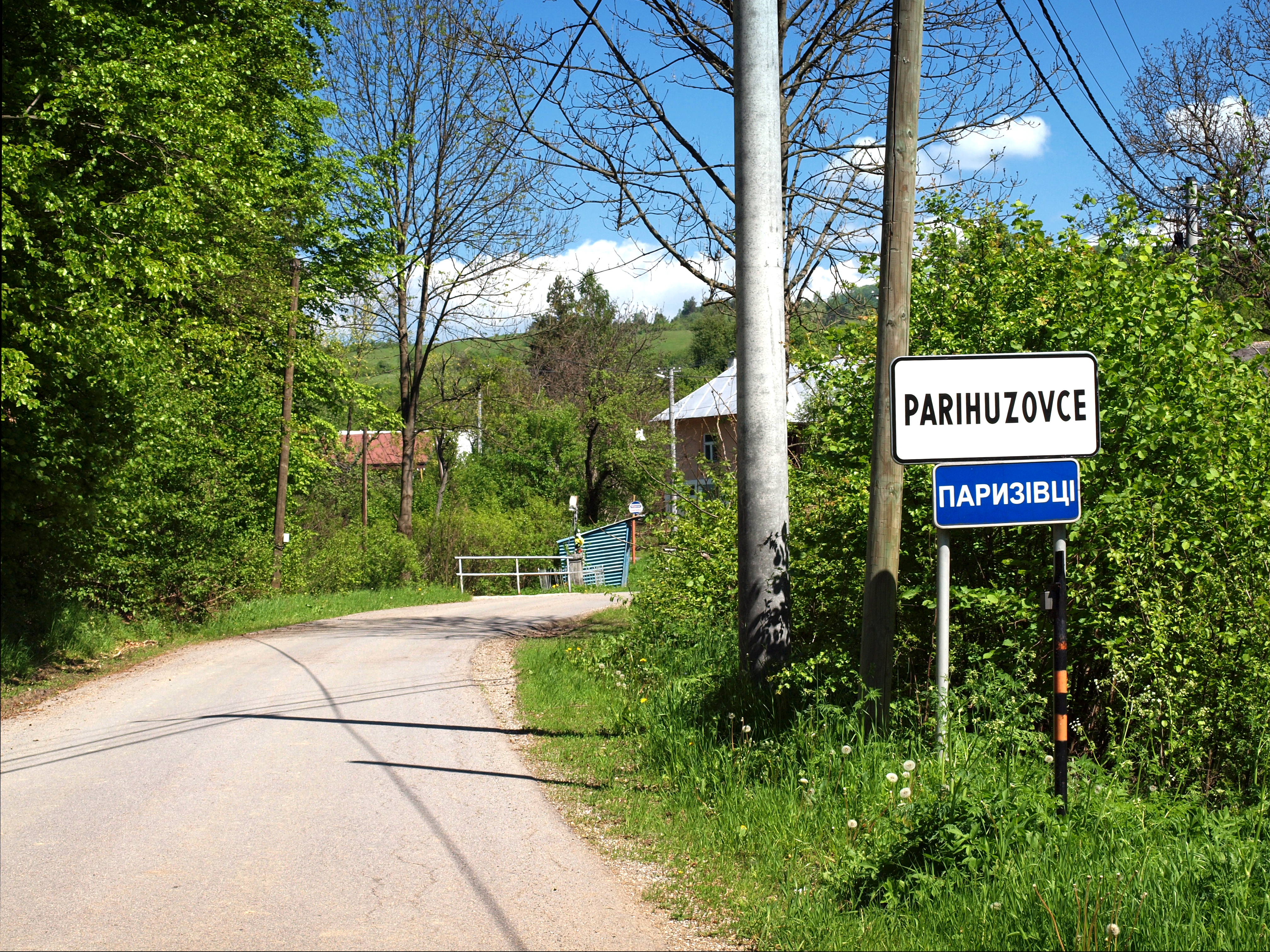 Parihuzovce, Prešov (Slovaquie) - L'entrée du village